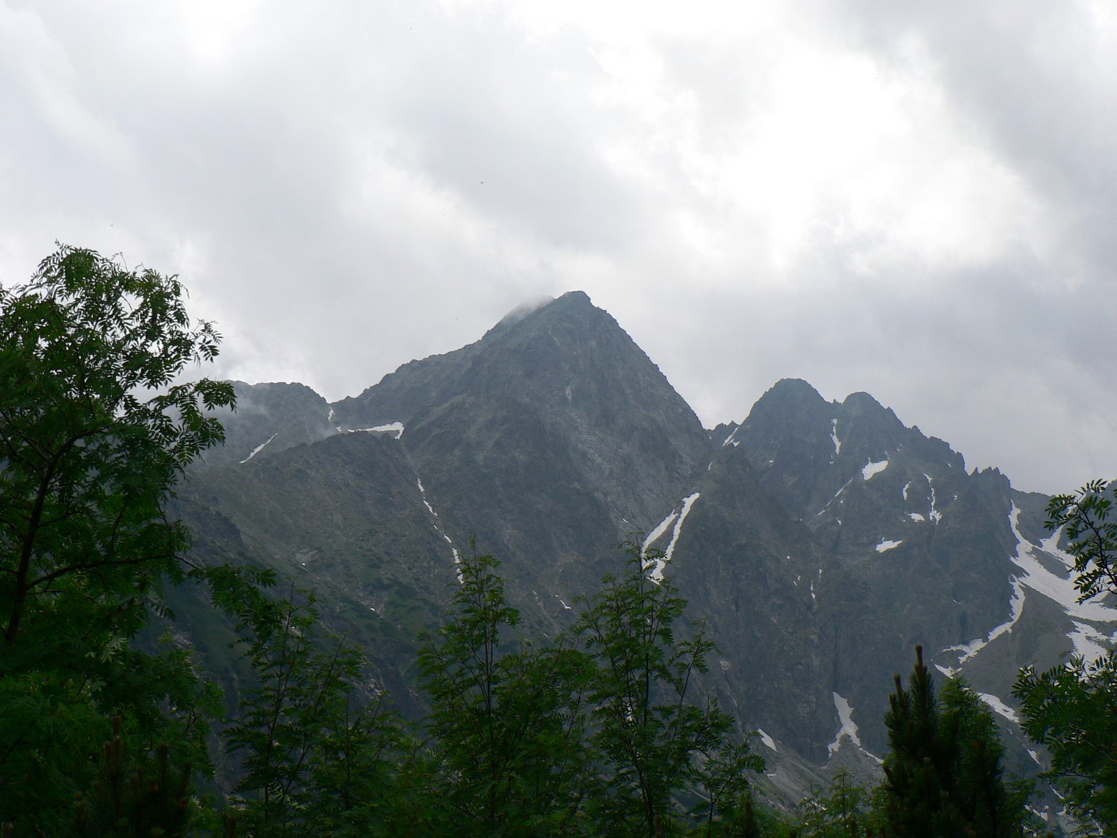 Kieżmarski Szczyt, Mały Kieżmarski Szczyt, Durny Szczyt i Mały Durny Szczyt z Doliny Kieżmarskiej